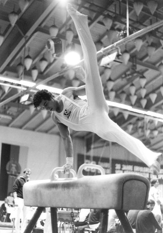 Michael Nikolay ADN-ZB Mittelstädt 2-10-79 Schwedt: 31. DDR-Meisterschaften - Mehrkampf - Seitpferdspezialist Michael Nikolay (SC Dynamo Berlin) setzte sich am Abend des 1.10.79 mit 110,60 Punkten an die Spitze des 18köpfigen Teilnehmerfeldes.